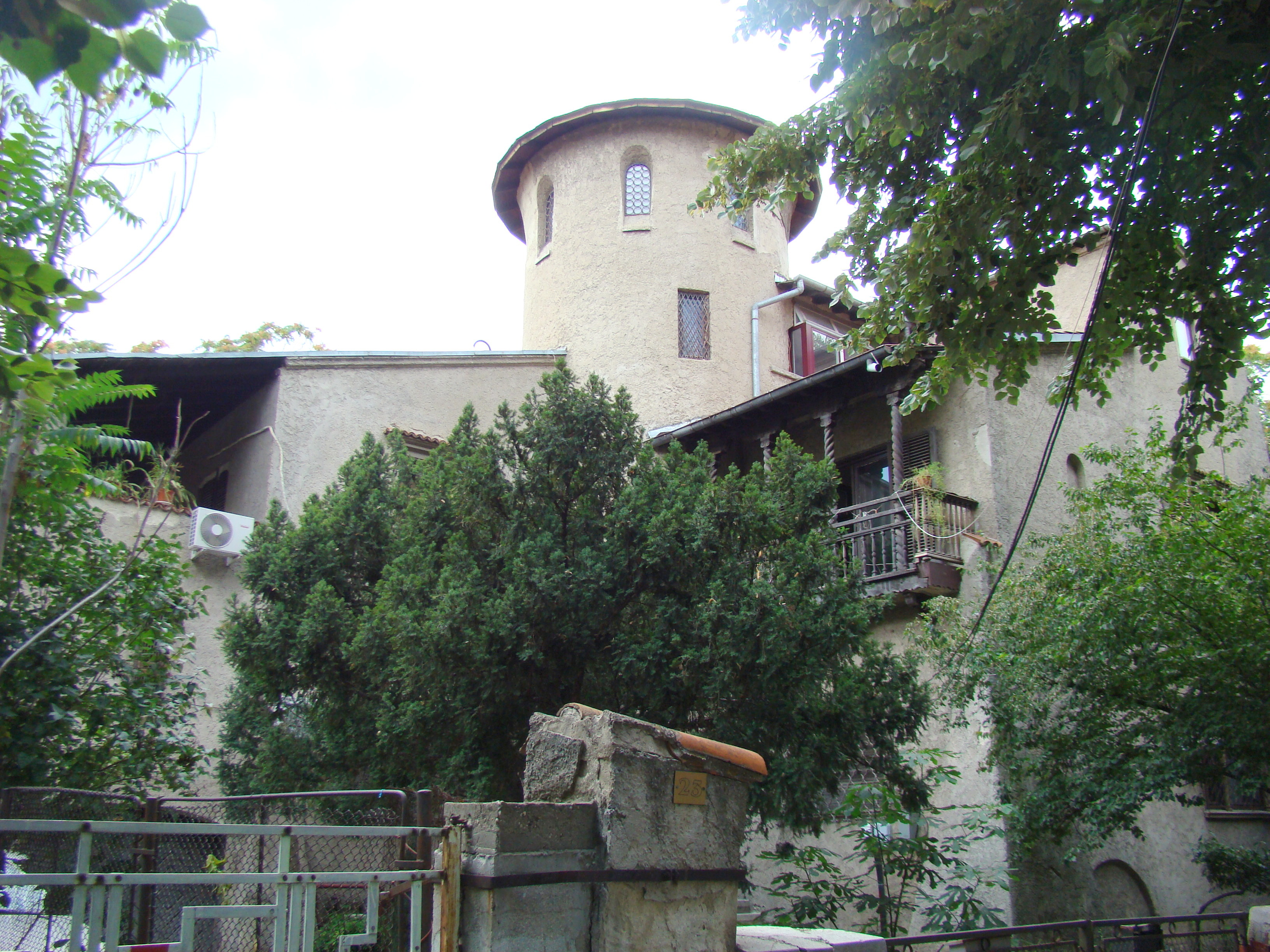 Casă monument istoric, str.Londra, nr.23